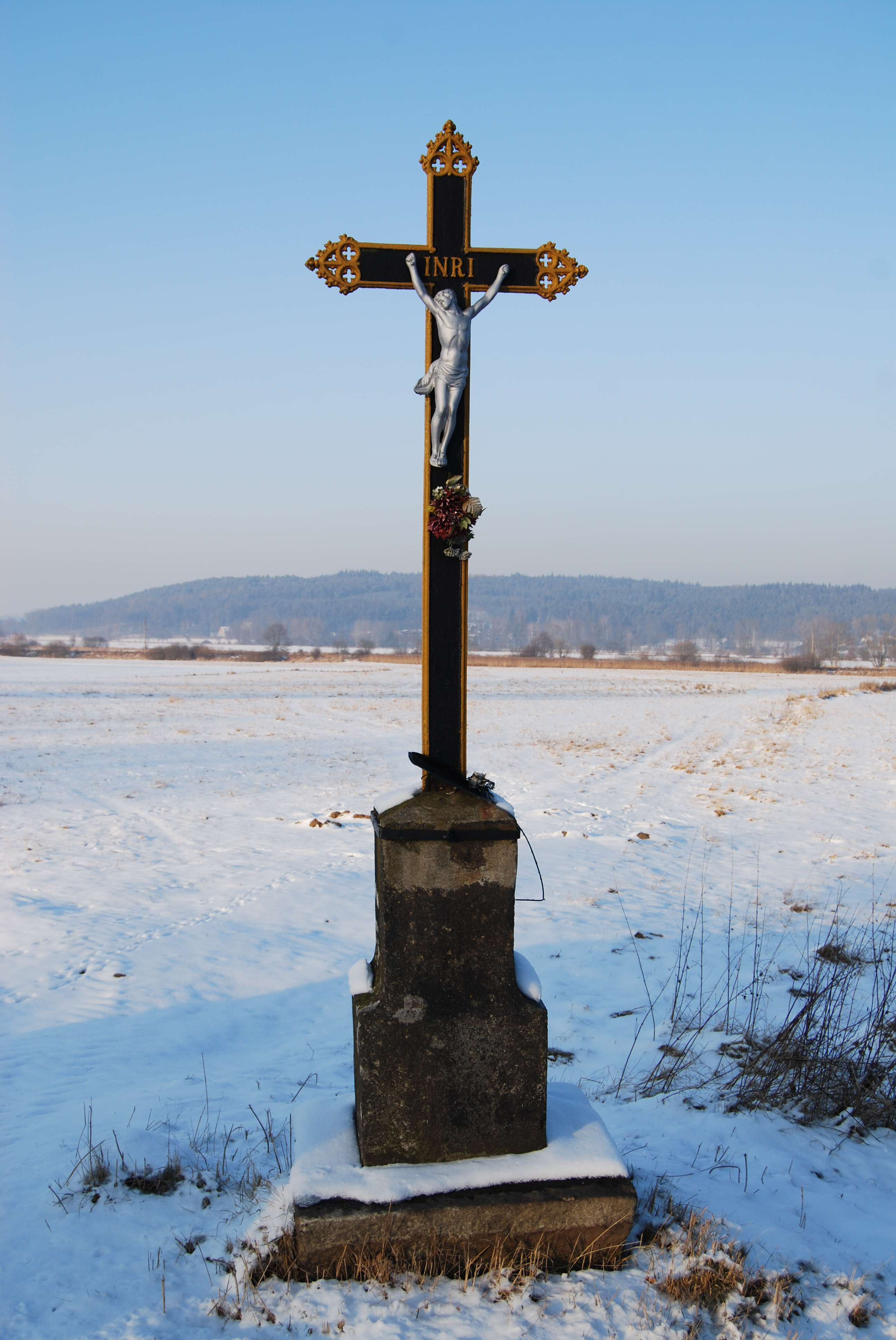 Kříž u komunikace vedoucí do obce. Heřmaň (okres Písek). Česká republika.